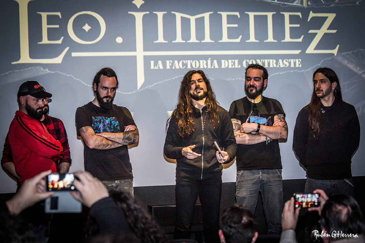 Fuente